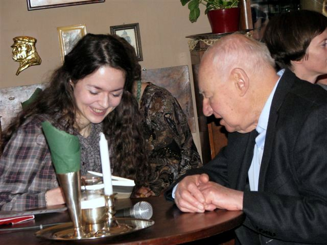 Jacek Bochenski (b. 1926), Polish writer and Katarzyna Marciniak, Polish scientist